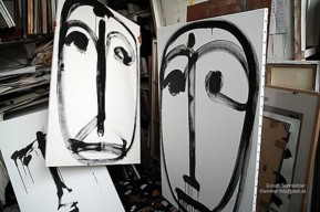 Im Atelier